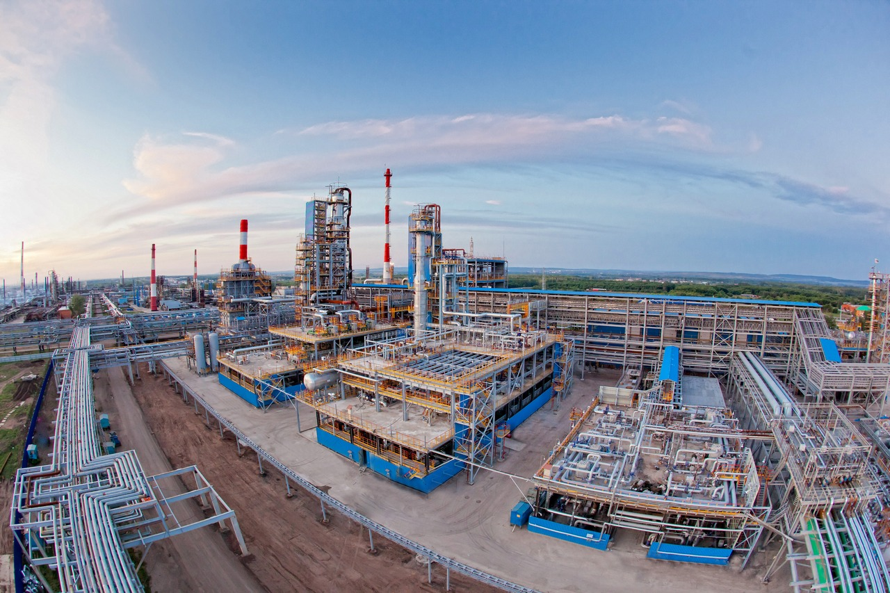 Газпром нефтехим Салават